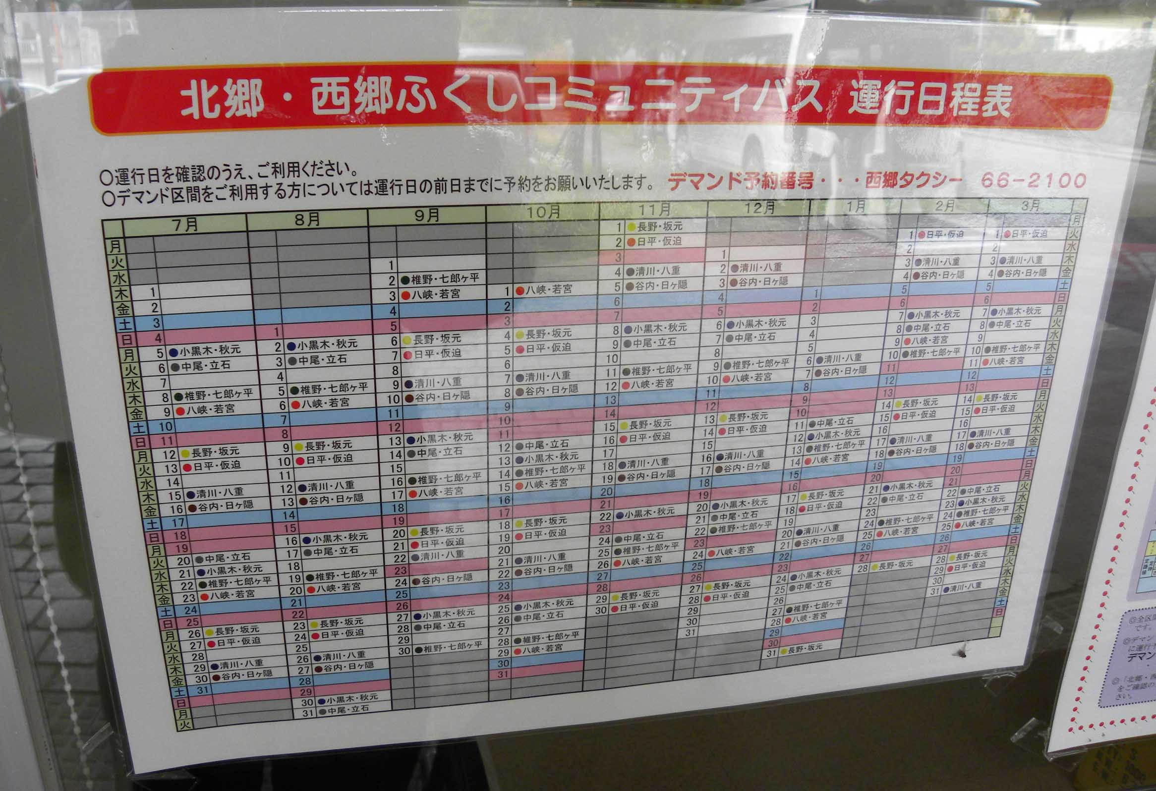 北郷・西郷ふくしコミュニティバス（宮崎県美郷町）の運行日程表（各線の運行日の一覧） ※西郷病院の玄関前に掲示